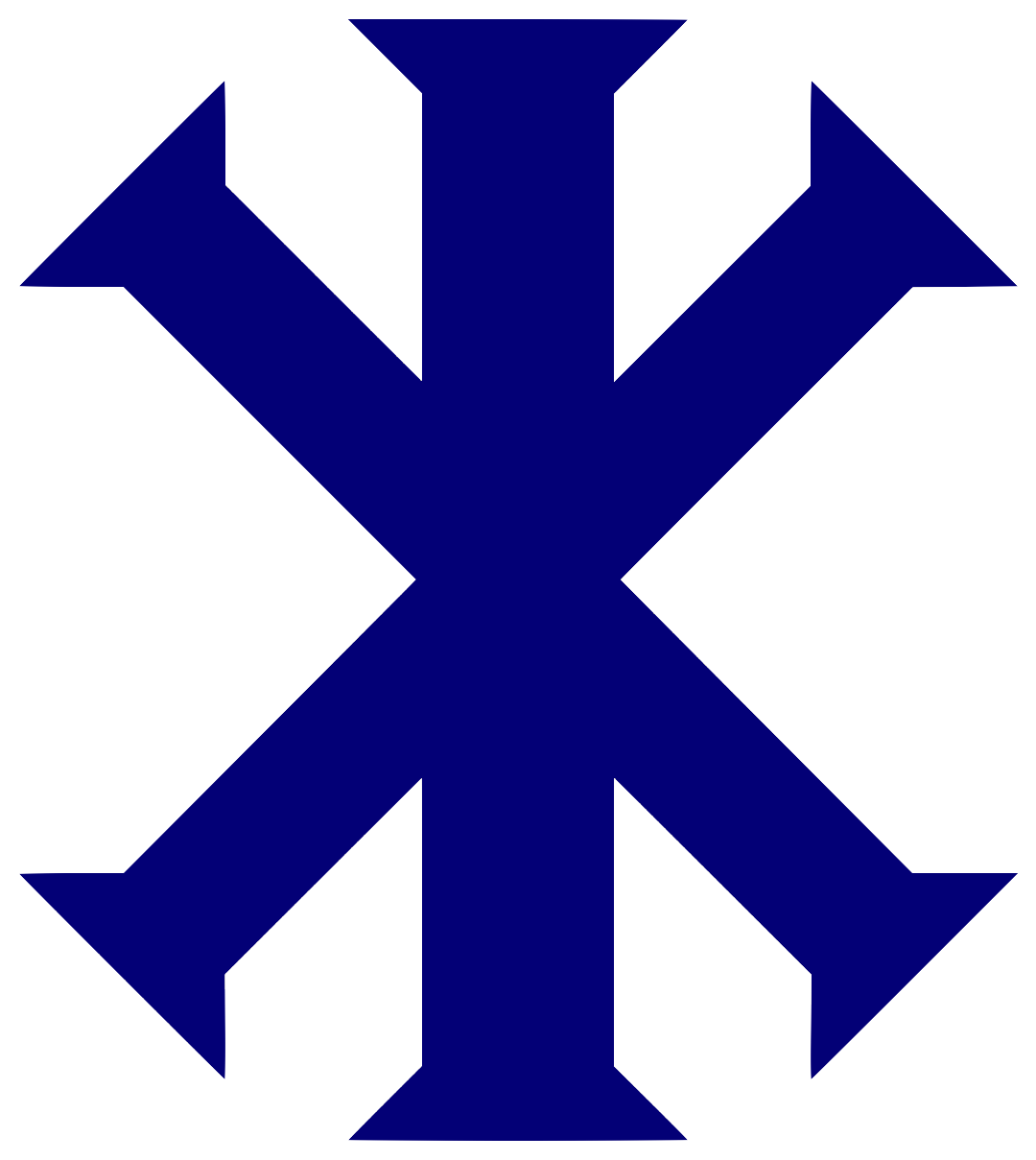 IX Monogram symbol